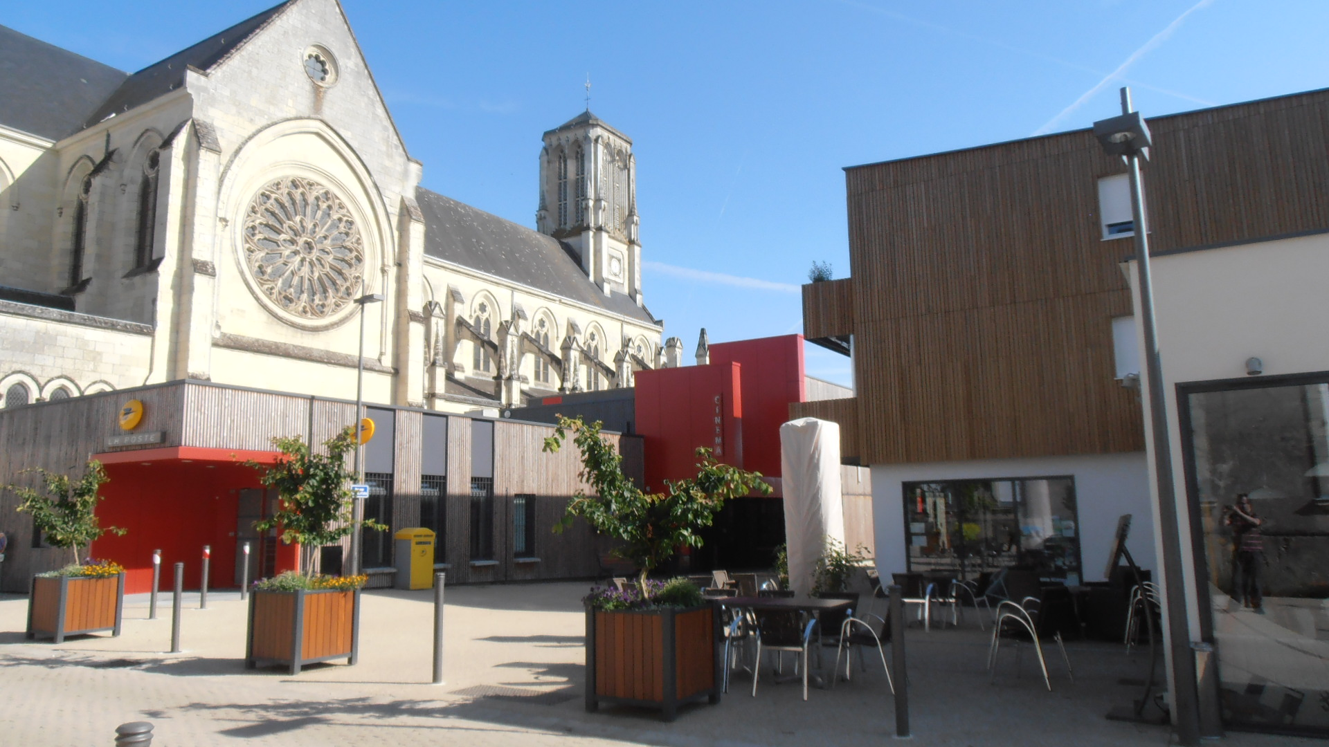 ruelle comprenant un petit restaurant, la poste et le cinéma